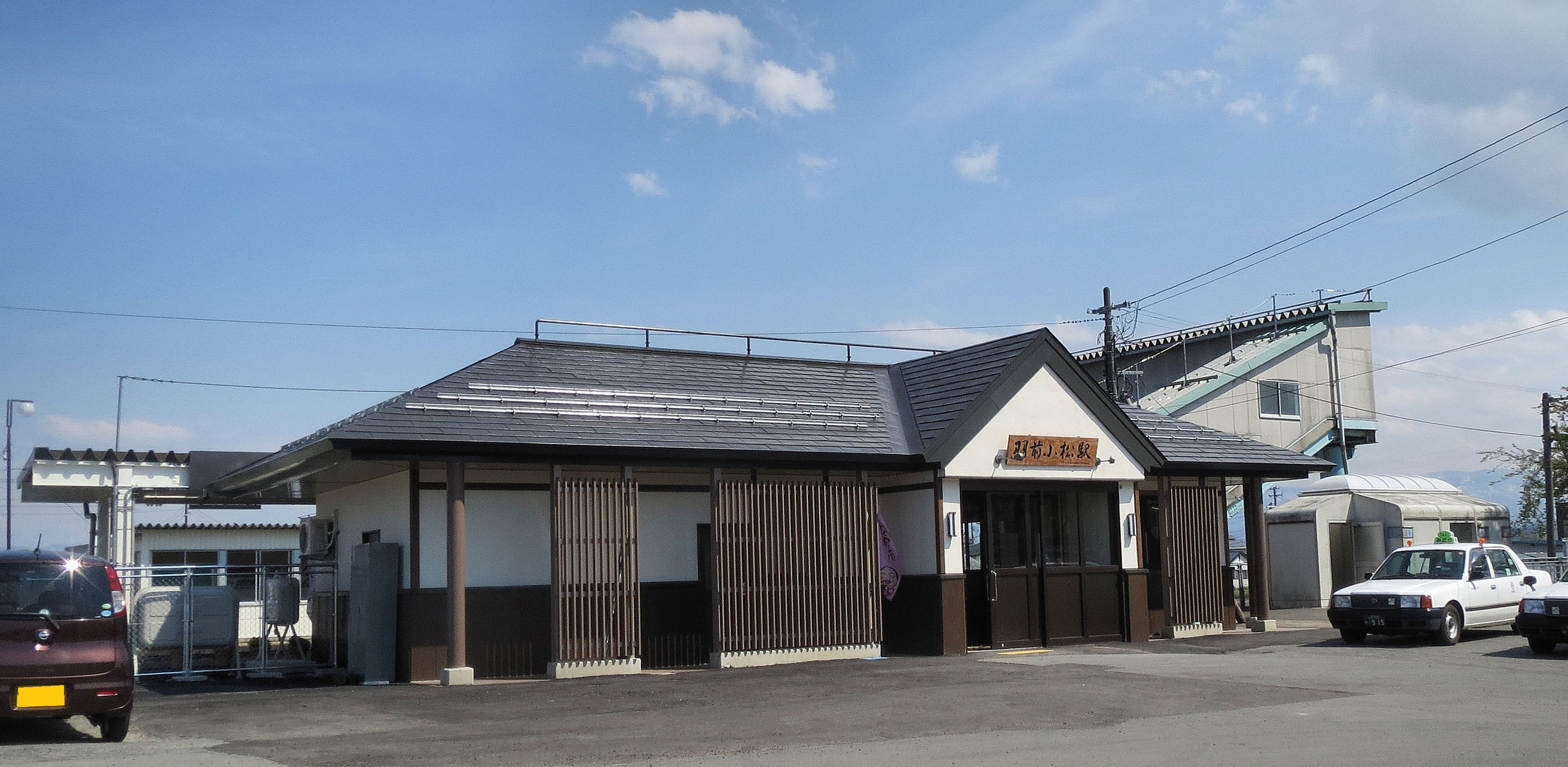 羽前小松駅 2014年建て替え